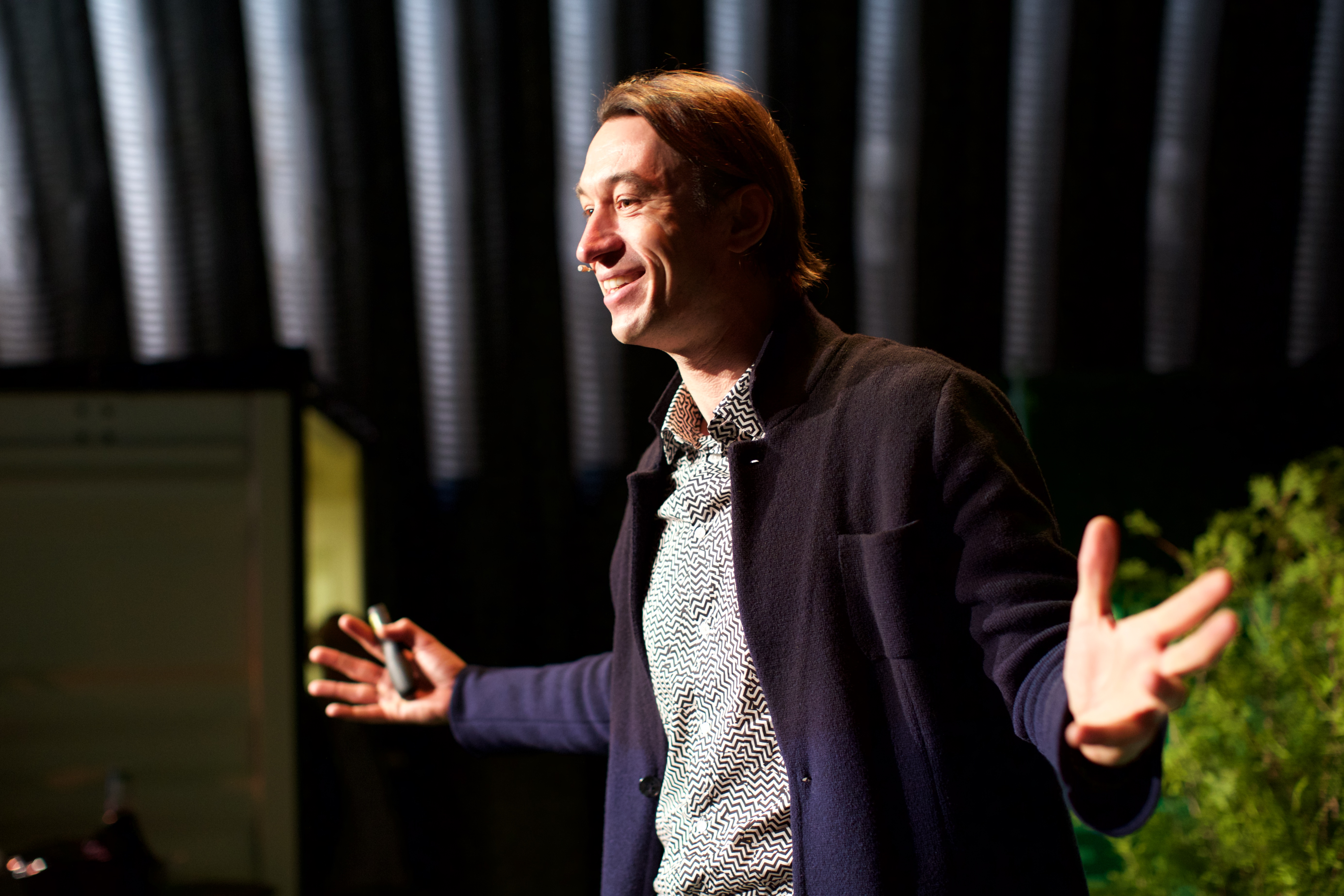 Op 5 februari 2015 vond de Natuurtop 2015 plaats, een bijeenkomst vol ‘inhoudelijke’ bedrijvigheid waar ervaringen en kennis werden uitgewisseld, inspiratie werd opgedaan en verbindingen werden gelegd tussen bestuurders en beleidsmedewerkers van Maatschappelijke (natuur) organisaties, bedrijfsleven, provincies en andere overheden.